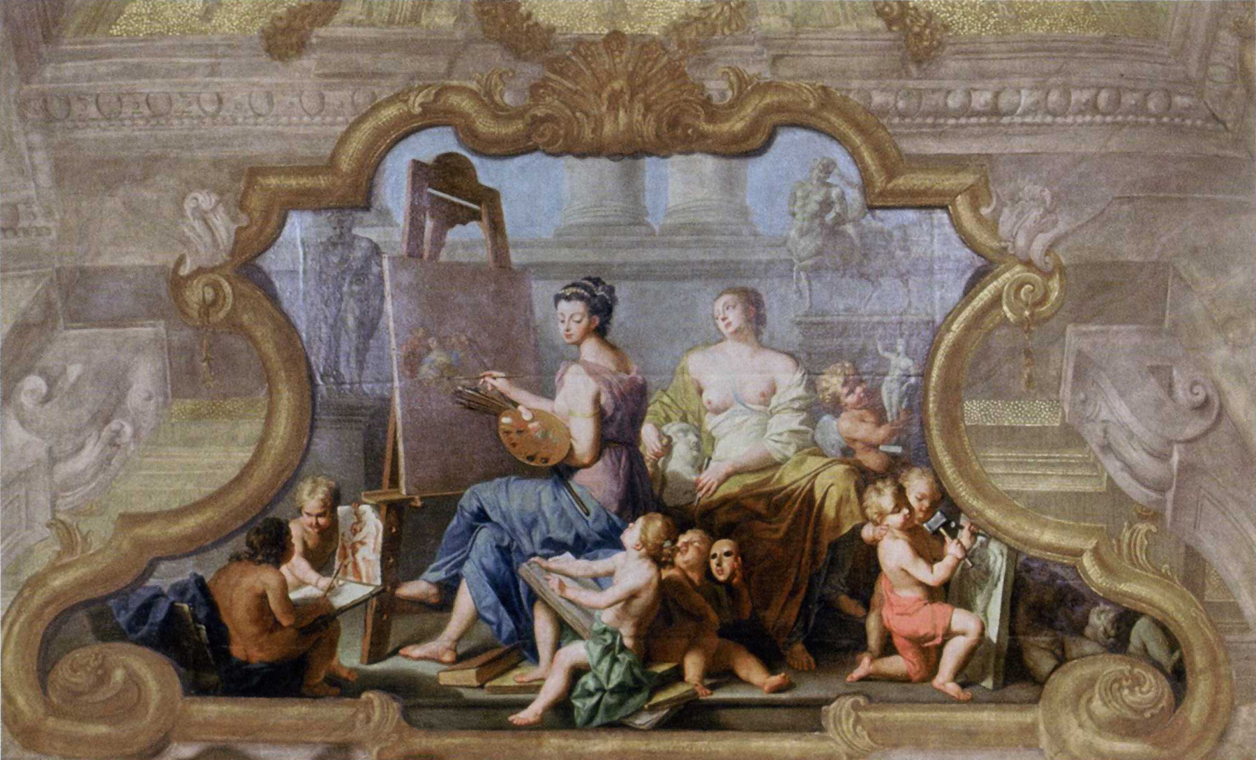 Allegorie der Mal- und Bildhauerkunst. Öl auf Leinwand (Marouflage), ca. 200 x 300 cm. Wien, Palais Dietrichstein-Lobkowitz, Decke des Festsaals